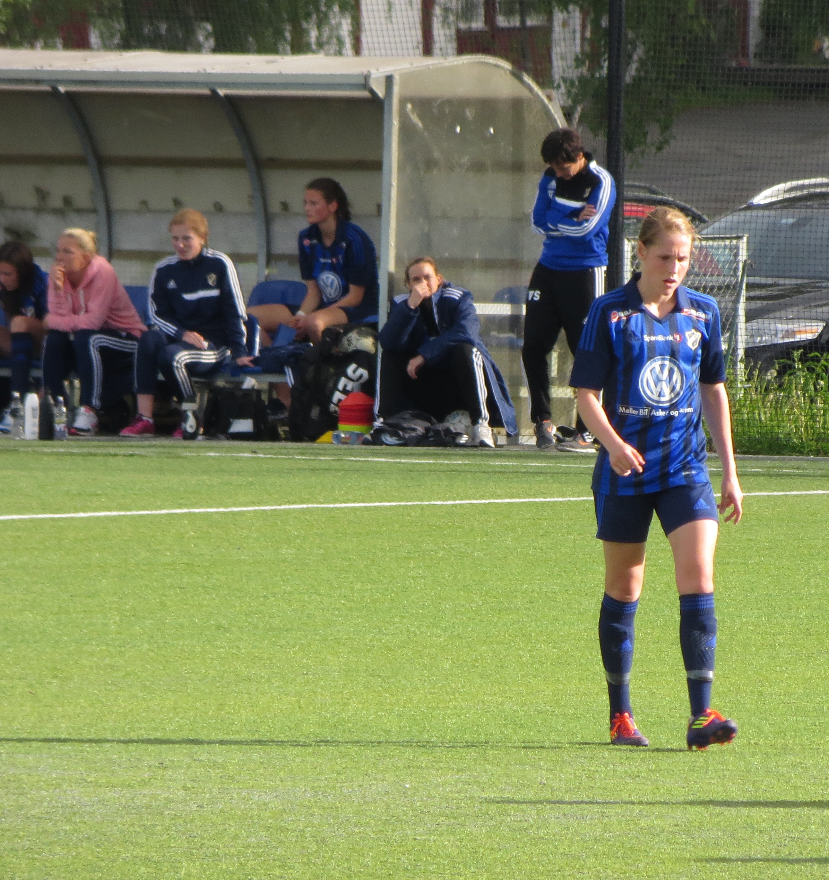 Hanne Ellingsen, player at Stabæk's J19 team, at Nadderud, 2013